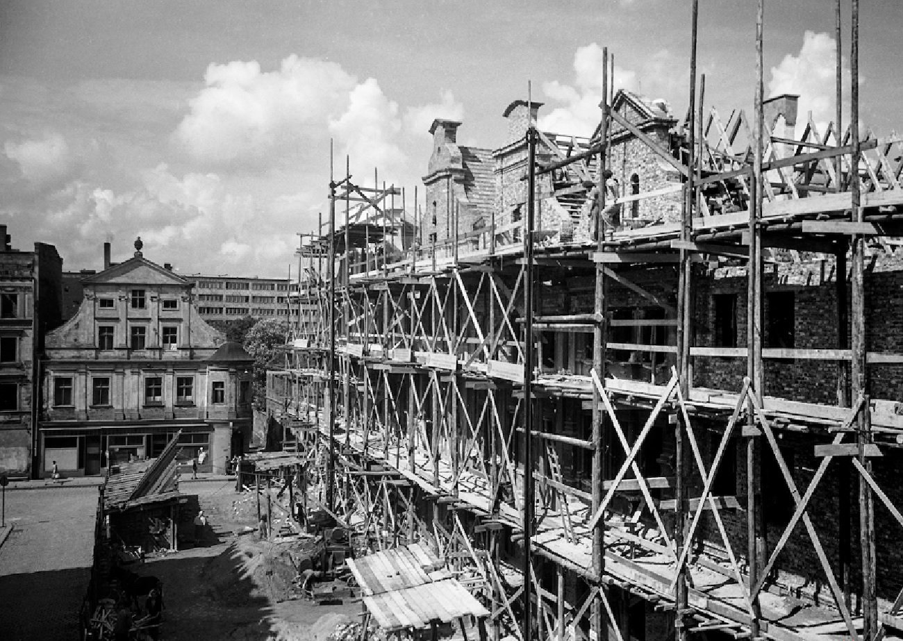 Odbudowa kamieniczek z północnej pierzei Rynku